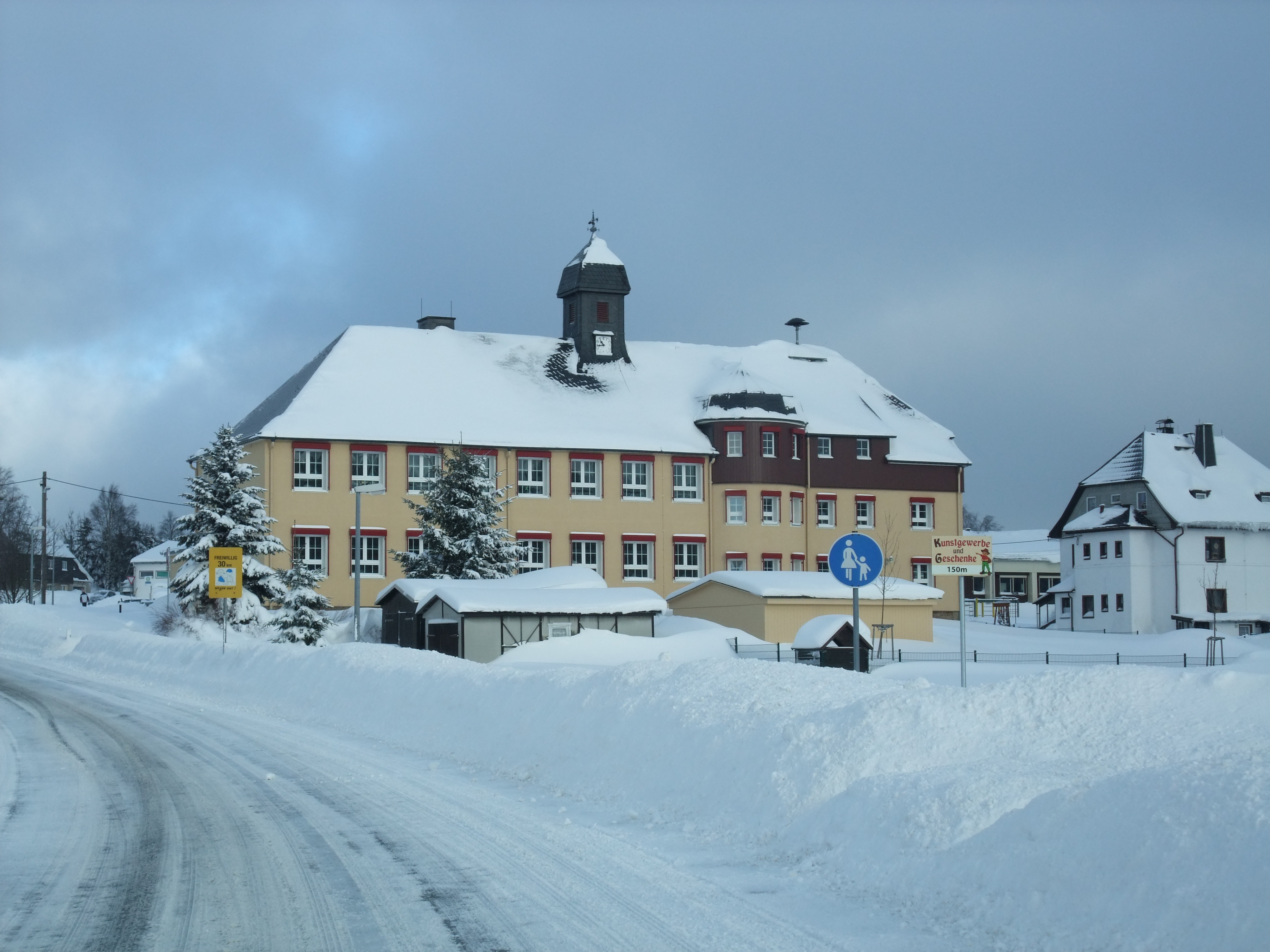 Die Grundschule in Kühnhaide aus Blickrichtung Südwesten.